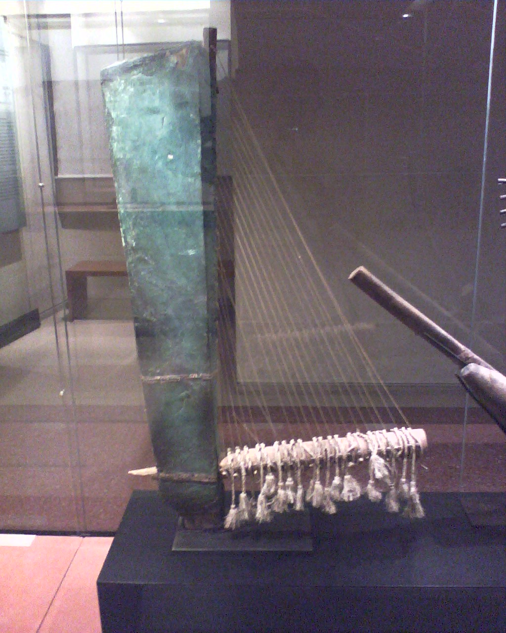 1069-332 a.v. J.-C. (après del Nouvel Empire) bois de pin marítime, de cêdre, cuir coloré; cordes modernes. Cette forme de harpe apparaît tard en Egypte (Museo du Louvre)